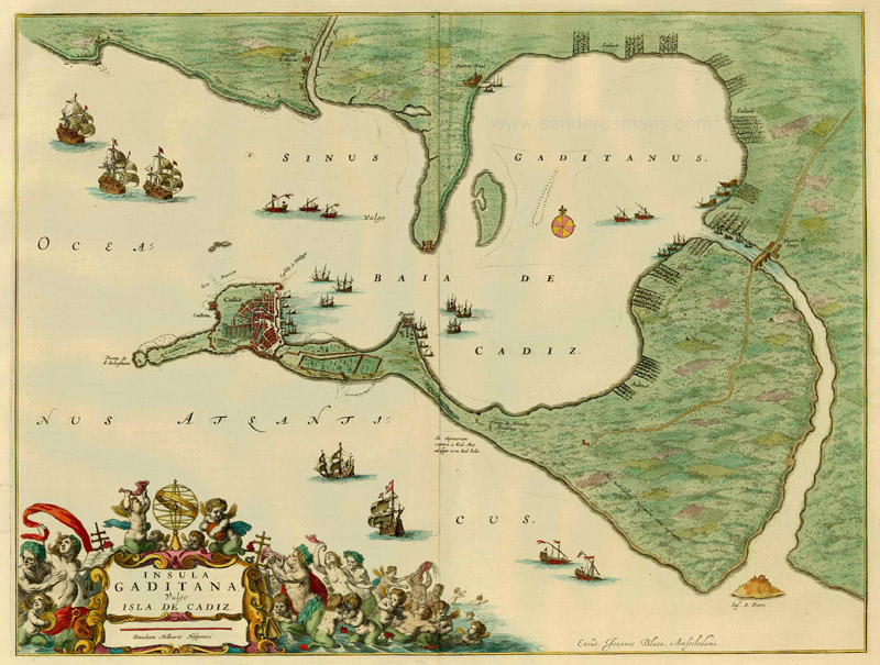 Insula Gaditana, vulgo isla de Cádiz. Mapa de la bahía de Cádiz, perteneciente al "Blaeus Grooten Atlas" de 1664.